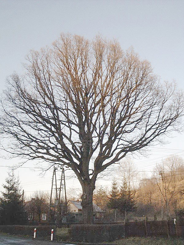 Stary dąb w Draganowej - zabytek przyrody. Obwód - 316 cm, wysokość, 19 m, wiek - 180 lat